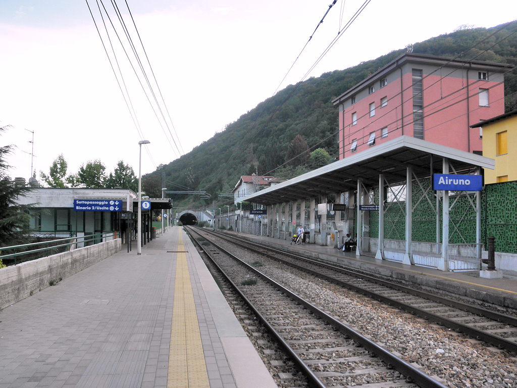 Stazione ferroviaria di Airuno